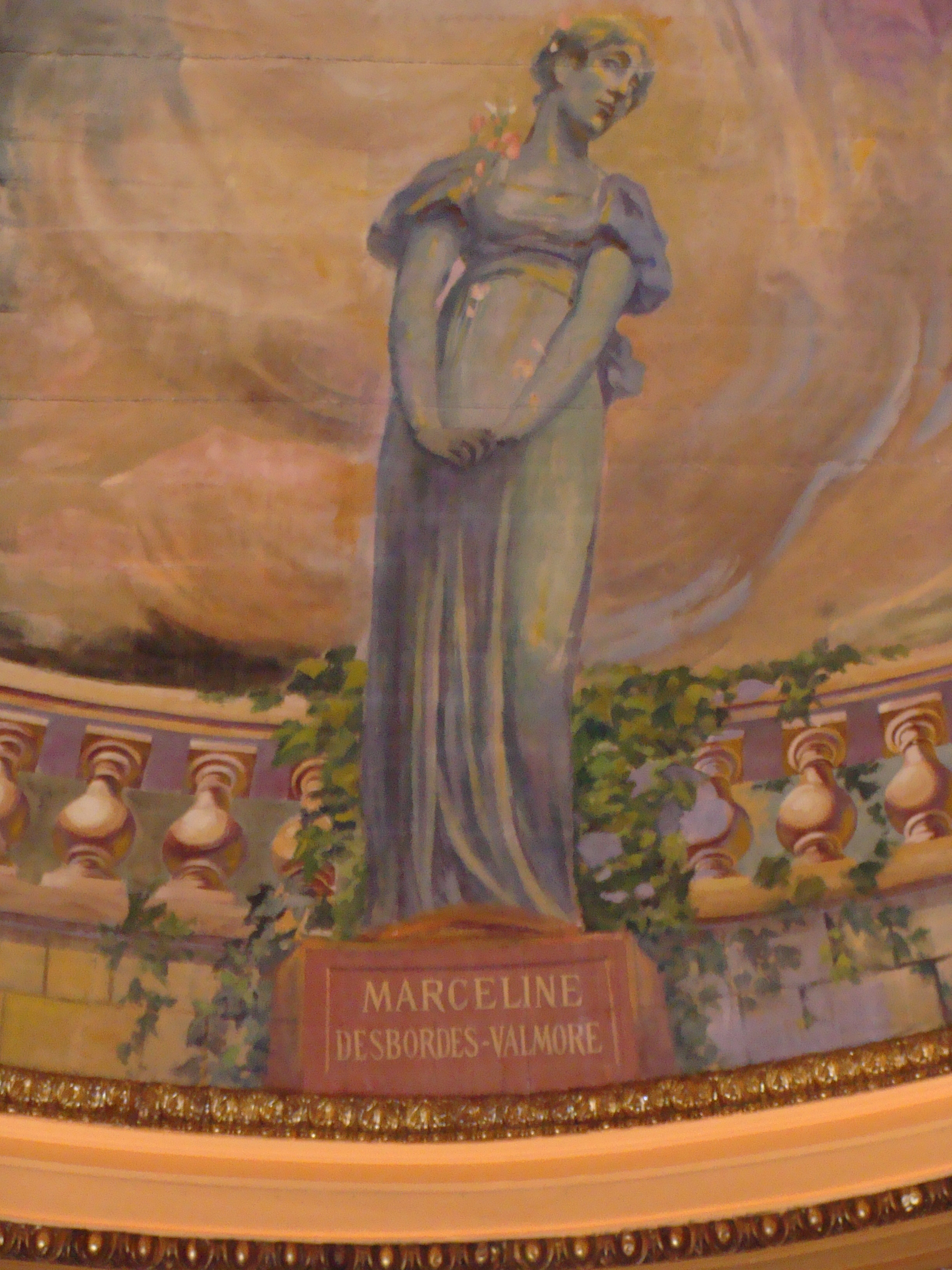 Charles-Alexandre-Joseph Caullet (1741-1825) et Maurice Rogerol (1873-1946) pour la restauration: Plafond paint (détail représentant Marcelien Desbordes-Valmore, poétesse française), salle à l'italienne du Théâtre municipal de Douai, Nord, France.